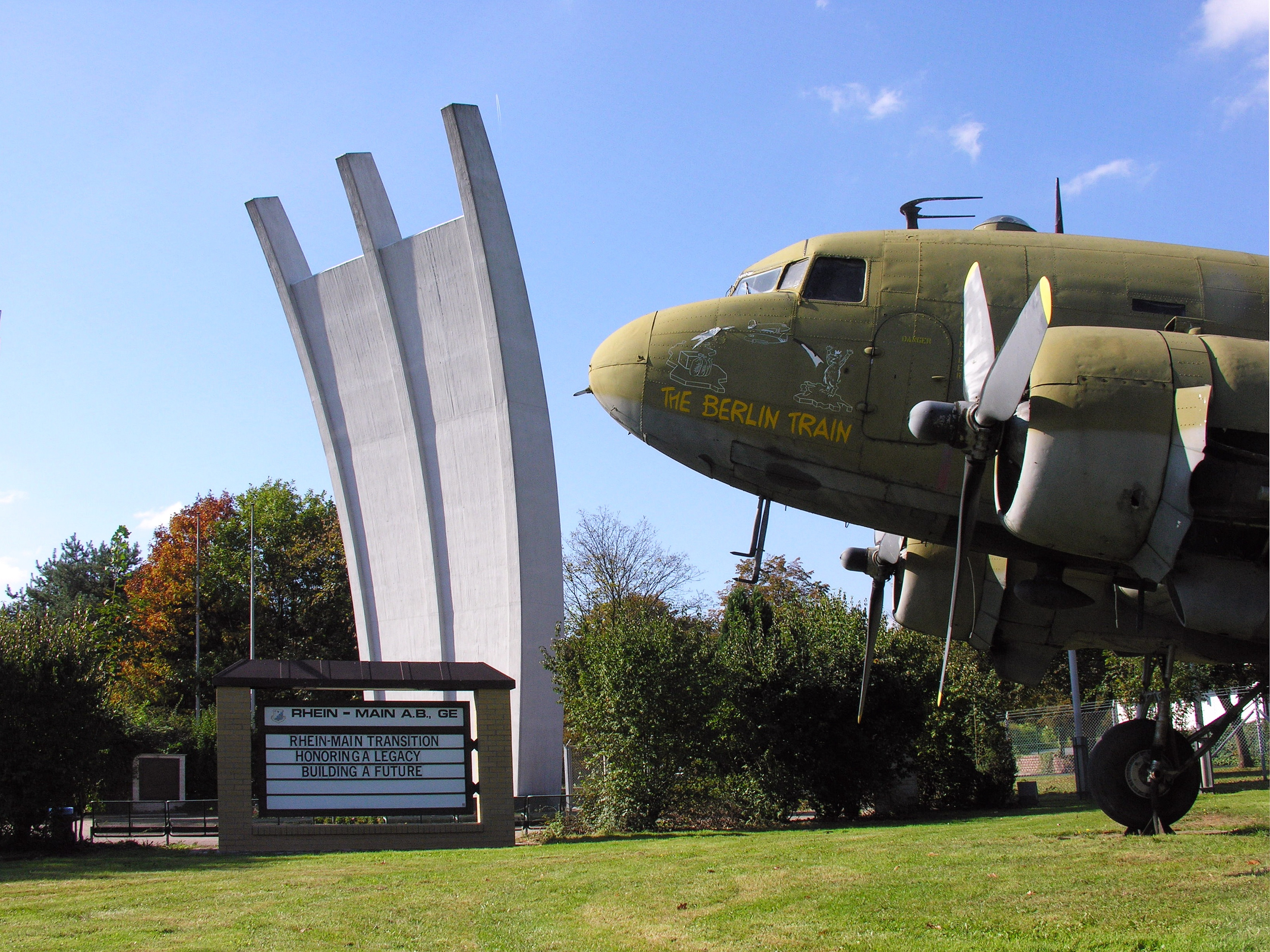 Auf dem Areal der Rhein Main Air Base "Gateway to Europe" entstand 1985 eine 1:1 Kopie des Airlift Memorial in Berlin. Flugzeug ist Douglas C47 USAF (DC3) - Das Areal des Airlift Memorial befindet sich nach Abzug der US Air Force von der RM AB in der Zuständigkeit des zivilen Flughafen Frankfurt am Main - Foto Wolfgang Pehlemann DSCN2670